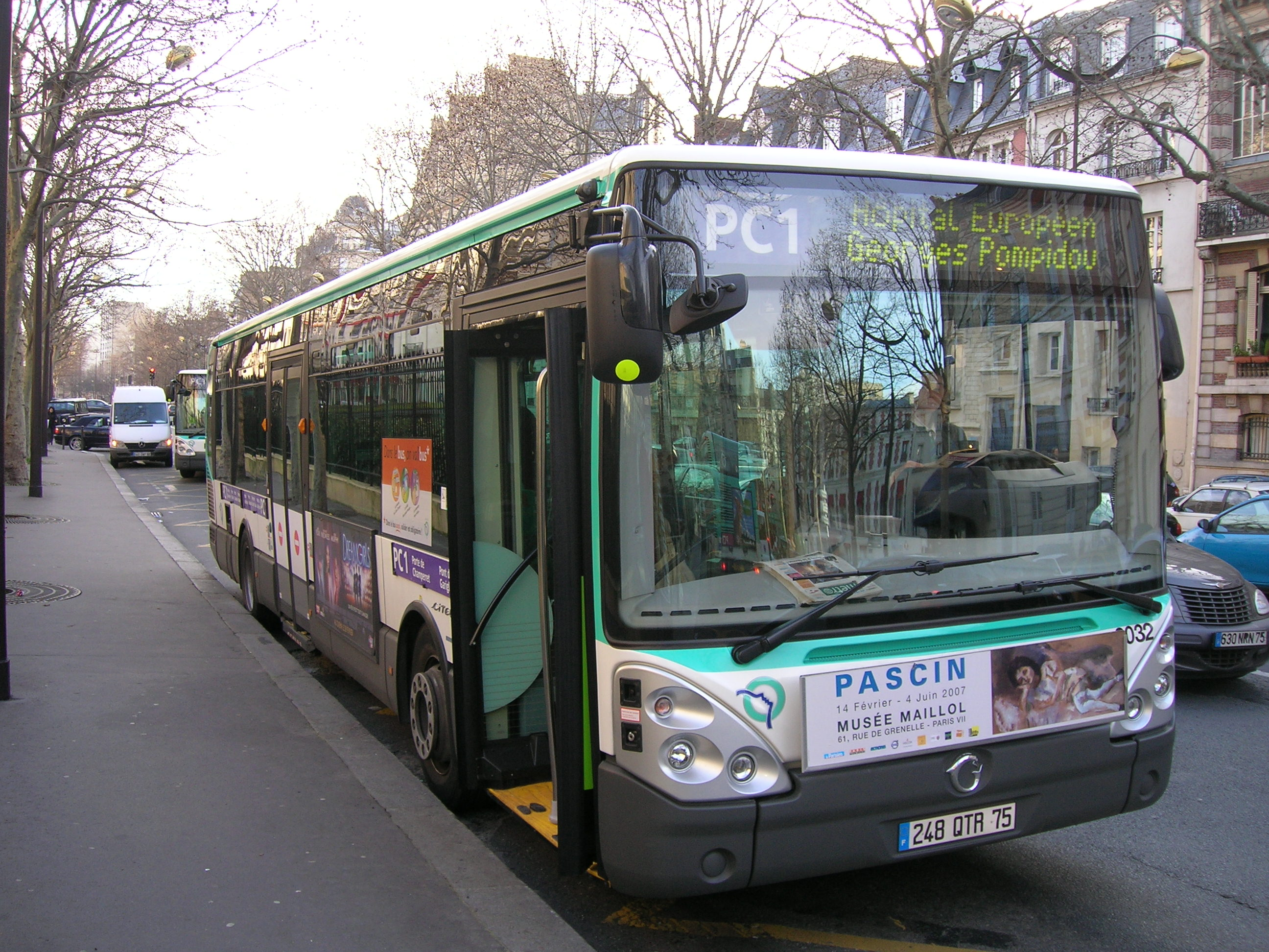 Bus Citelis sur la ligne PC1 de la RATP au terminus Porte de Champerret, Paris